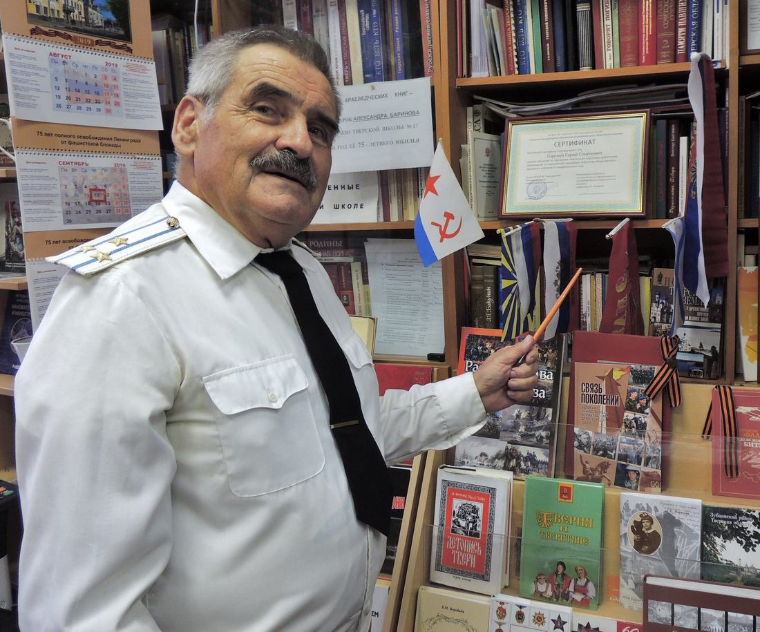 Горевой Г. С. - полковник в отставке, ветеран Вооруженных сил, кандидат технических наук, доцент кафедры туризма и природопользования ТвГУ, мастер спорта СССР по туризму, действительный член Русского Географического общества, член Ассоциации Тверских землячеств